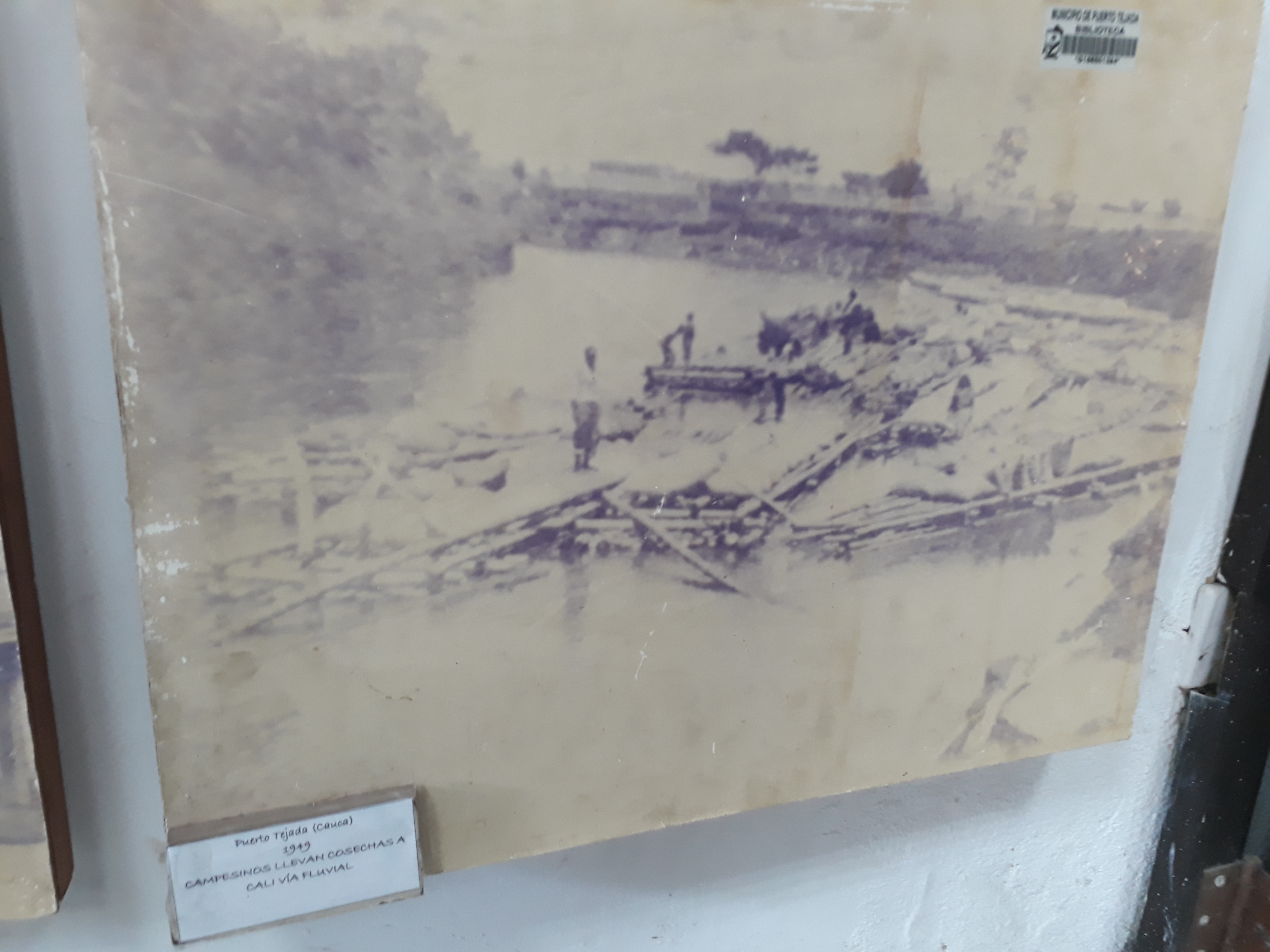 se ilustra como eran bajados los mercados de las balsas